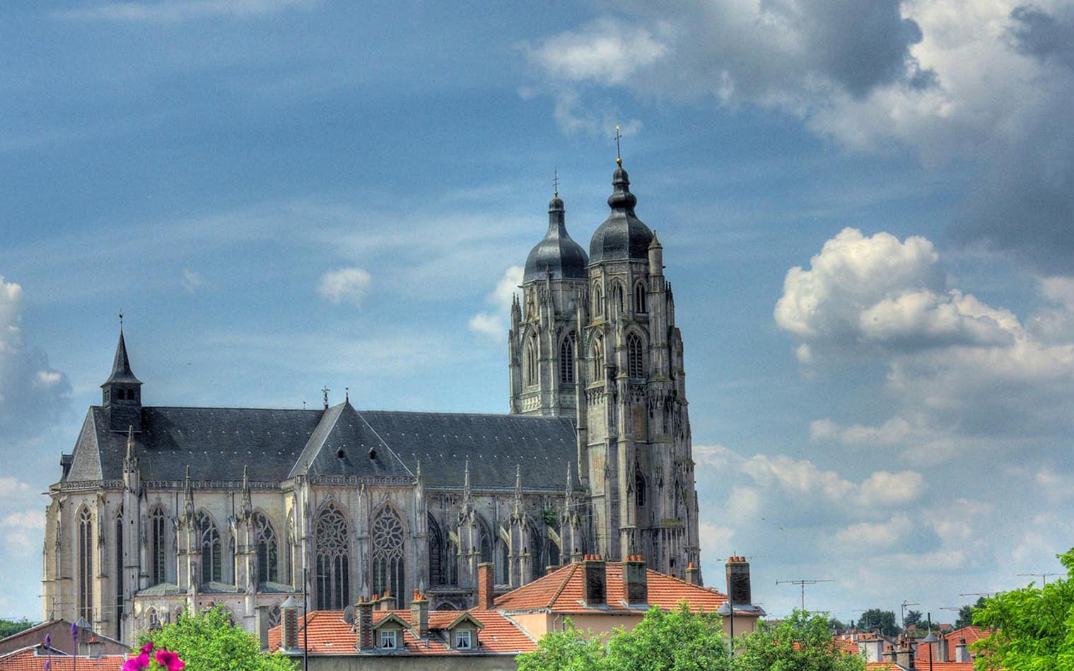 Basilique Saint-Nicolas, Saint-Nicolas-de-Port, Meurthe-et-Moselle, Lorraine, 16ème siècle.